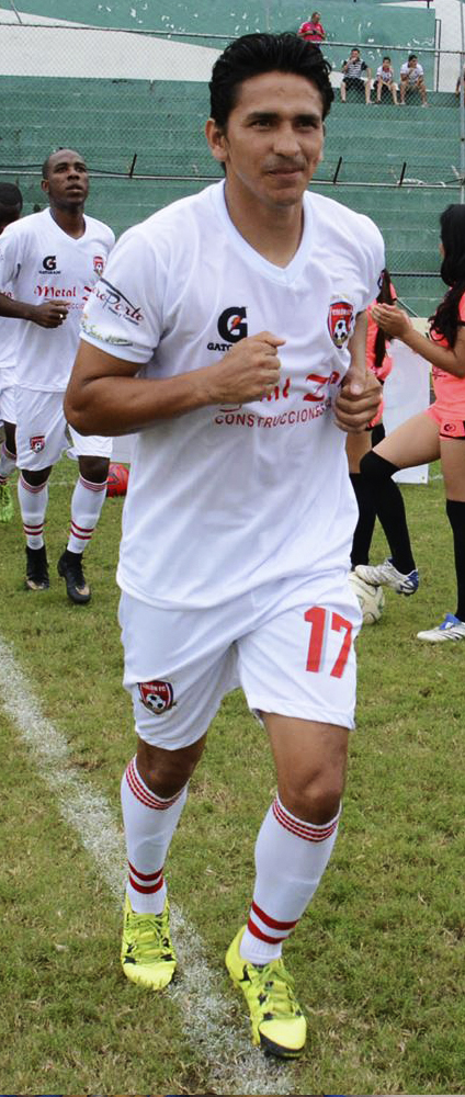 Wilfrido Vínces jugando para el Colón FC en el 2016